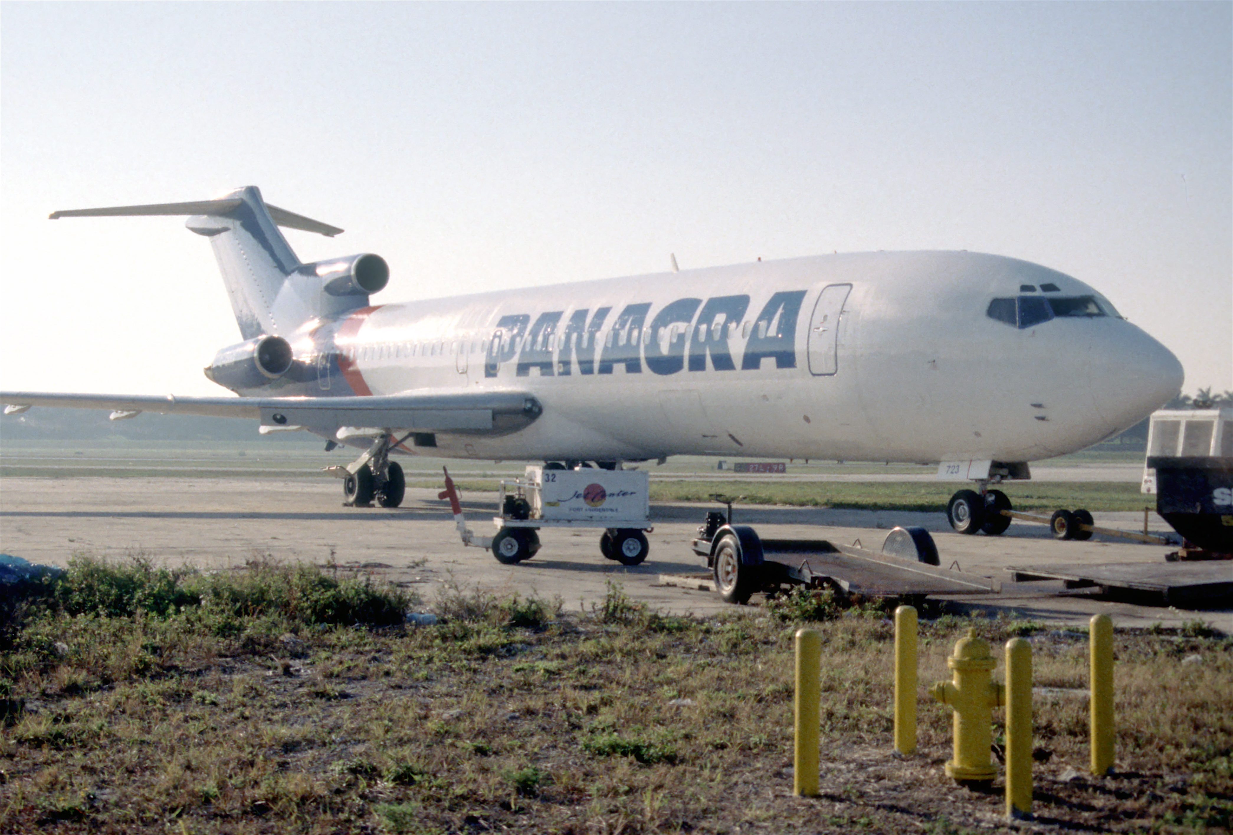 11aa - Panagra Airways Boeing 727-227; C-GKKF@FLL;30.01.1998